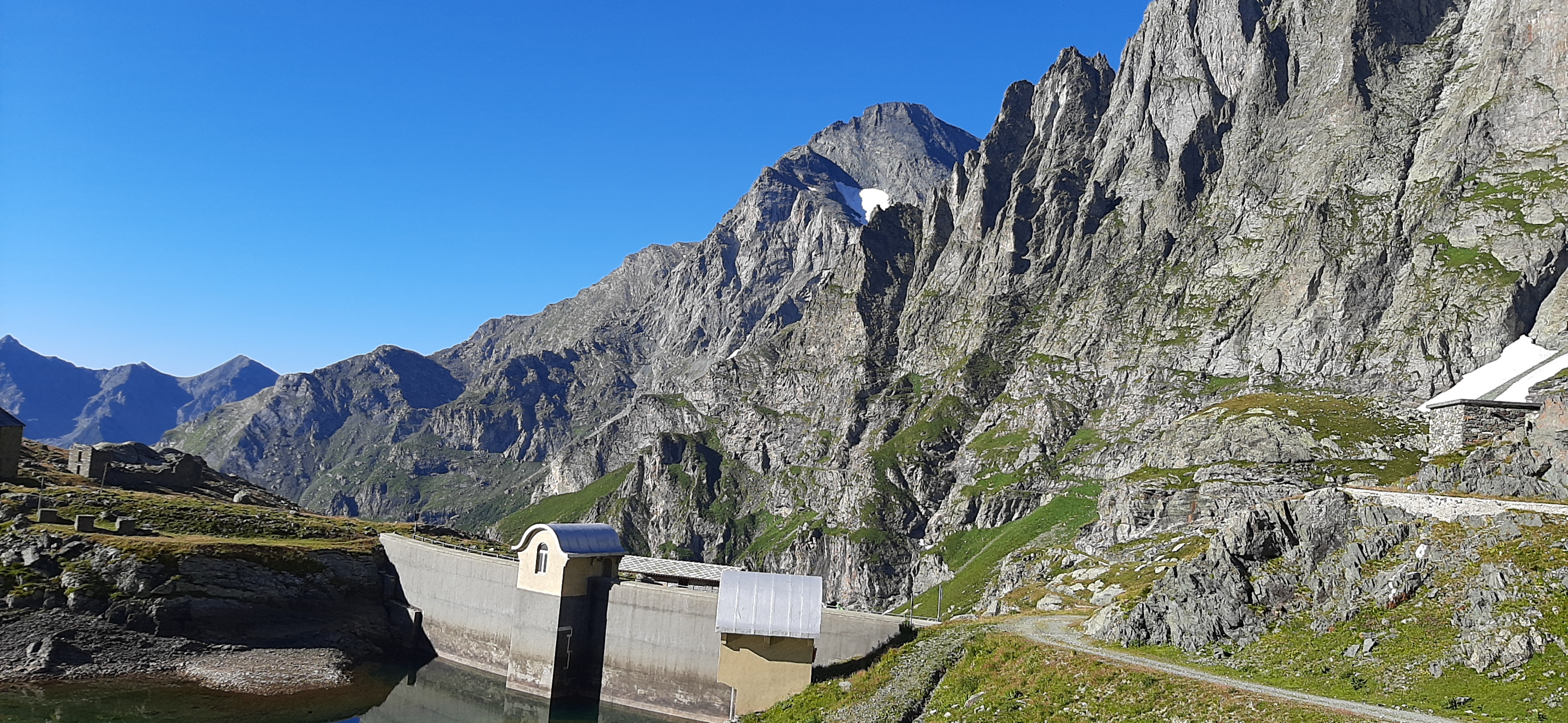 La diga del lago Dietro la Torre nel vallone d'Arnas in valle di Viù